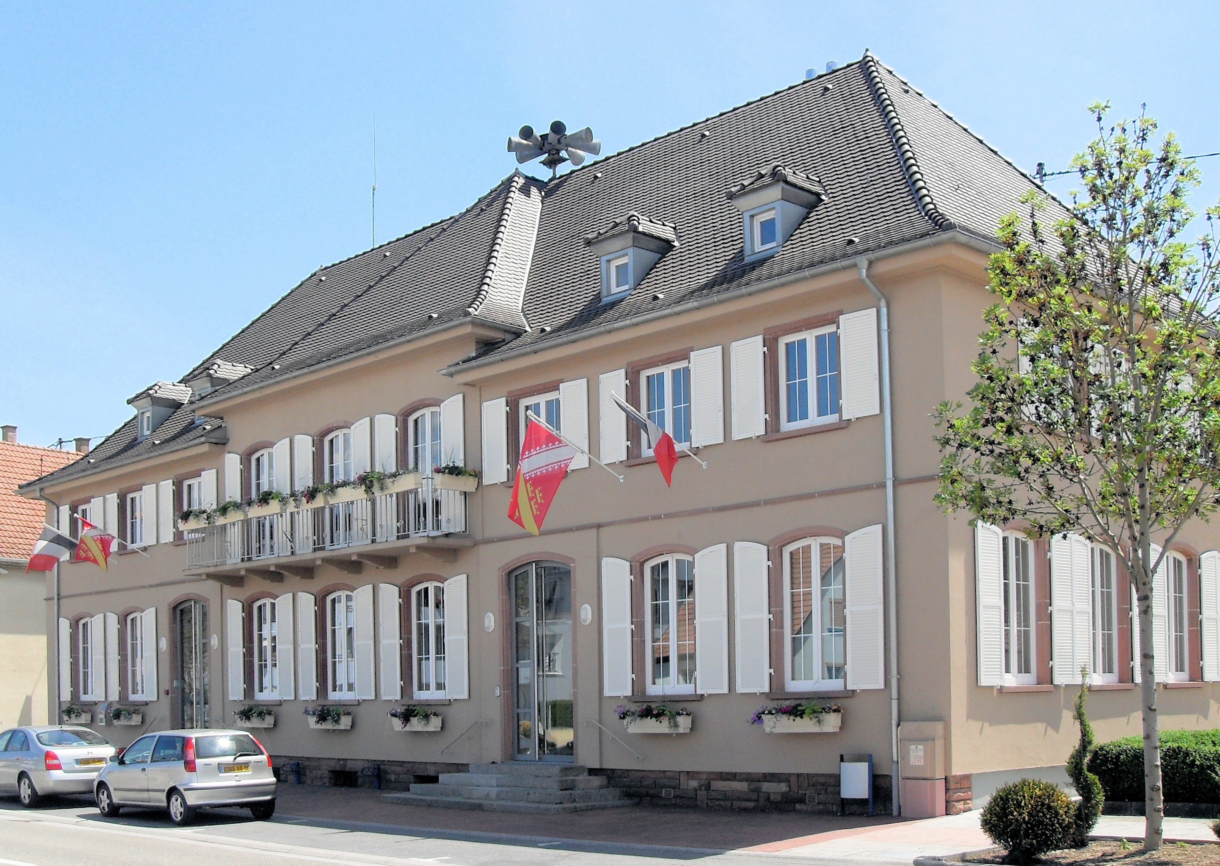 La mairie de Biesheim